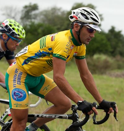 Ciclista uruguayo Néstor Pías en la Vuelta ciclista del Uruguay 2012